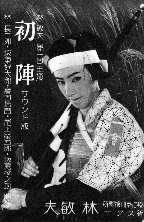 『初陣』、フライヤー、1933年